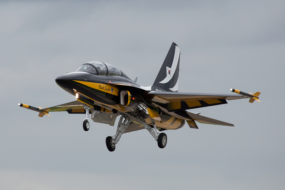 FIA 2012